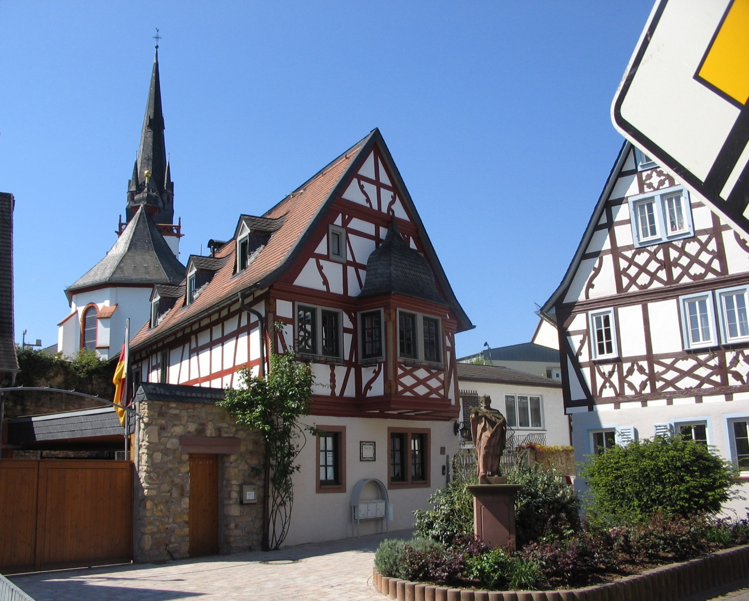 Ortsbild von Erbach im Rheingau, Fachwerkäuser am Markt und katholische Pfarrkirche Sankt Markus, Blick nach Westen